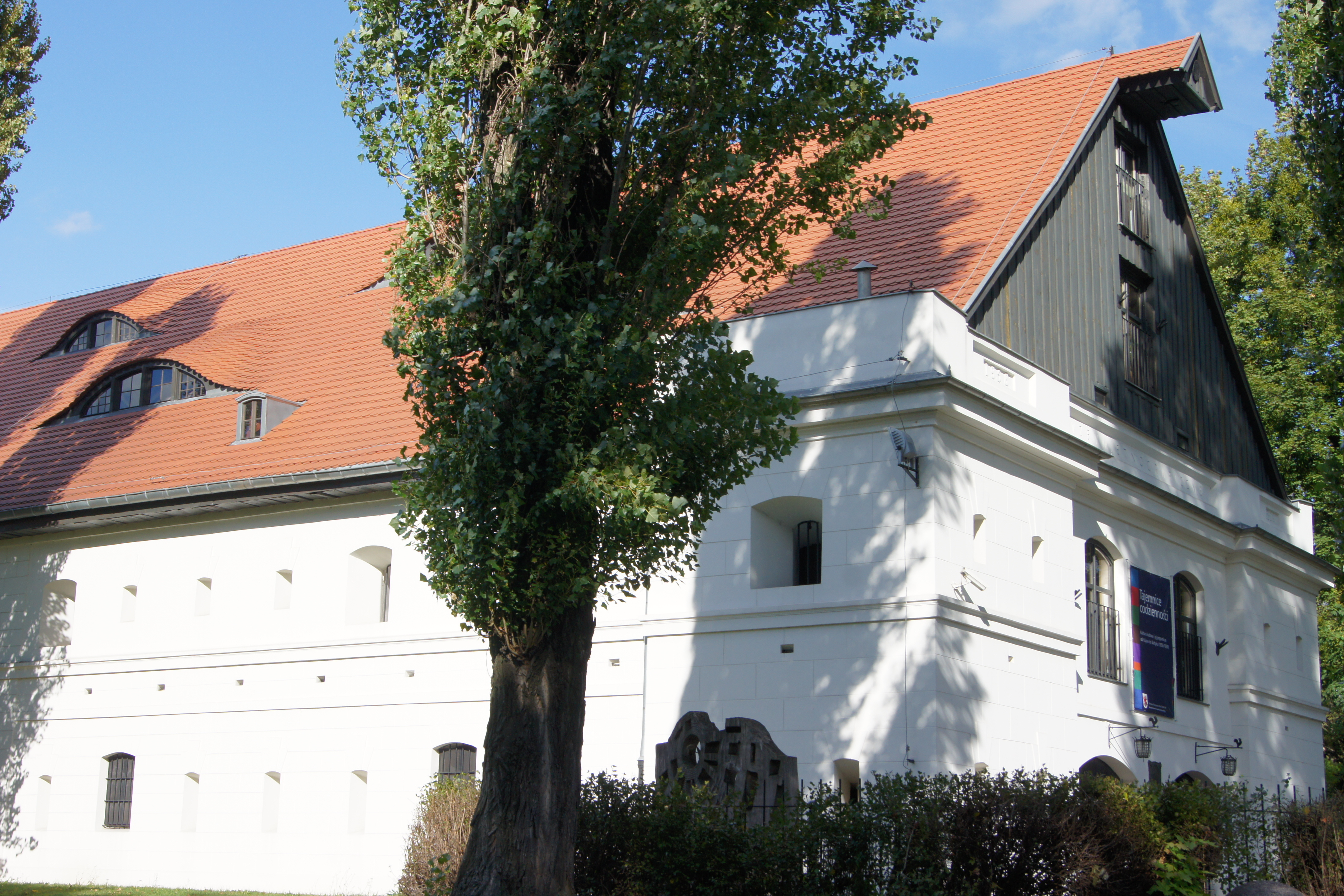 Toruń, ul. Wały Gen. Sikorskiego 19 - Twierdza Toruń: arsenał artyleryjski, 1824 (zabytek nr rejestr. A/594)